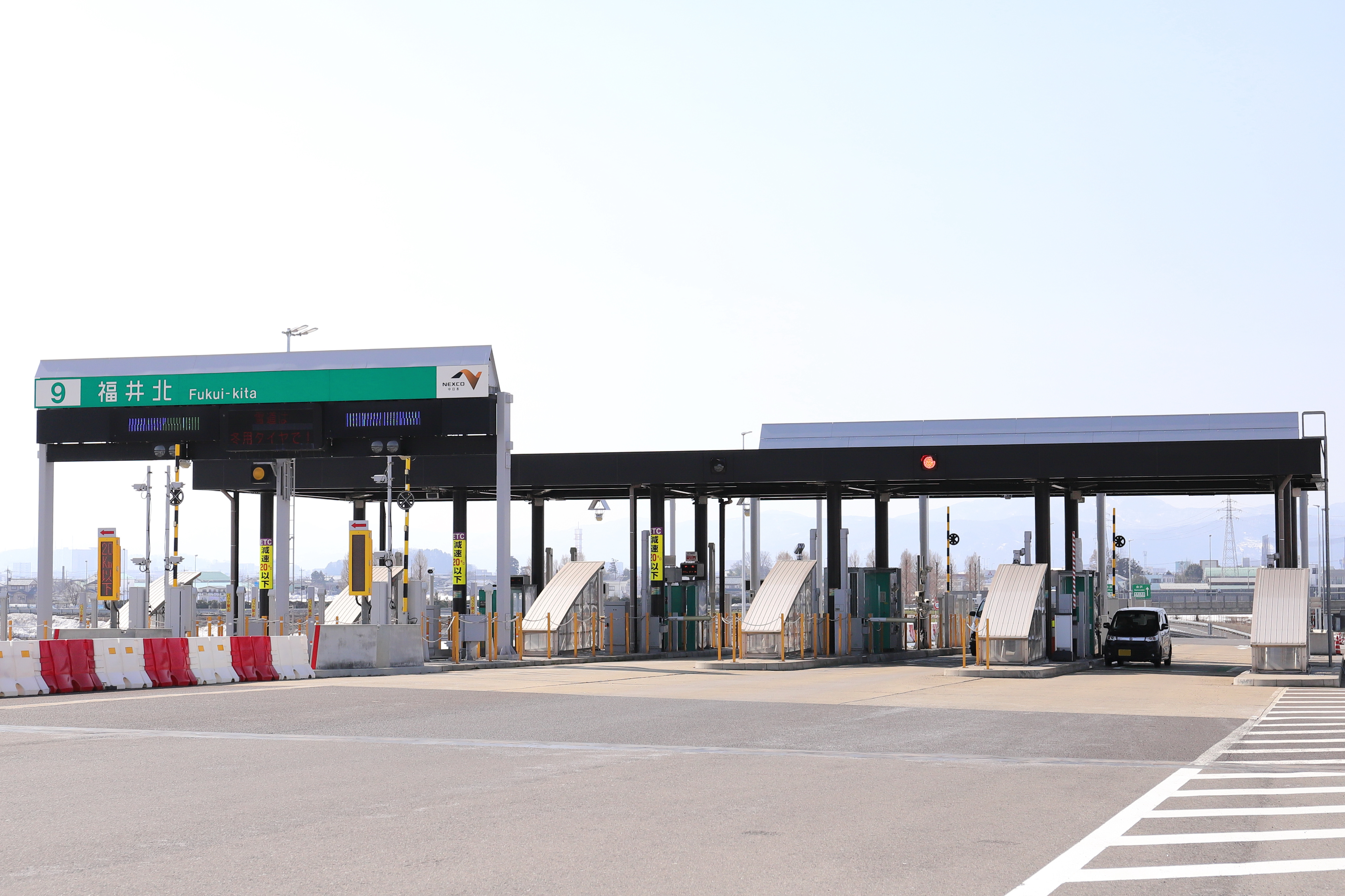 福井北ジャンクション・インターチェンジ（福井県福井市）